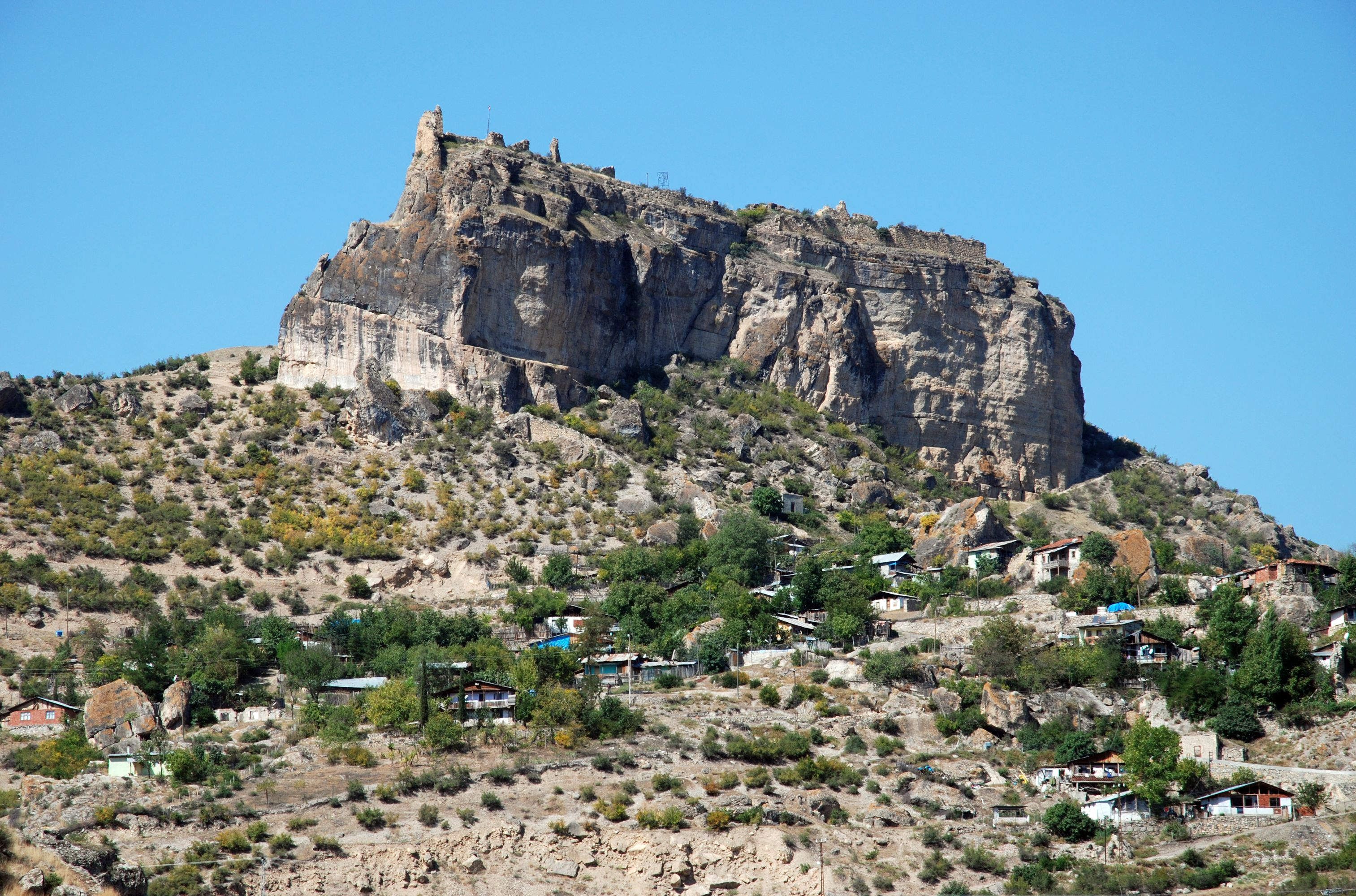 Ardanuç castle